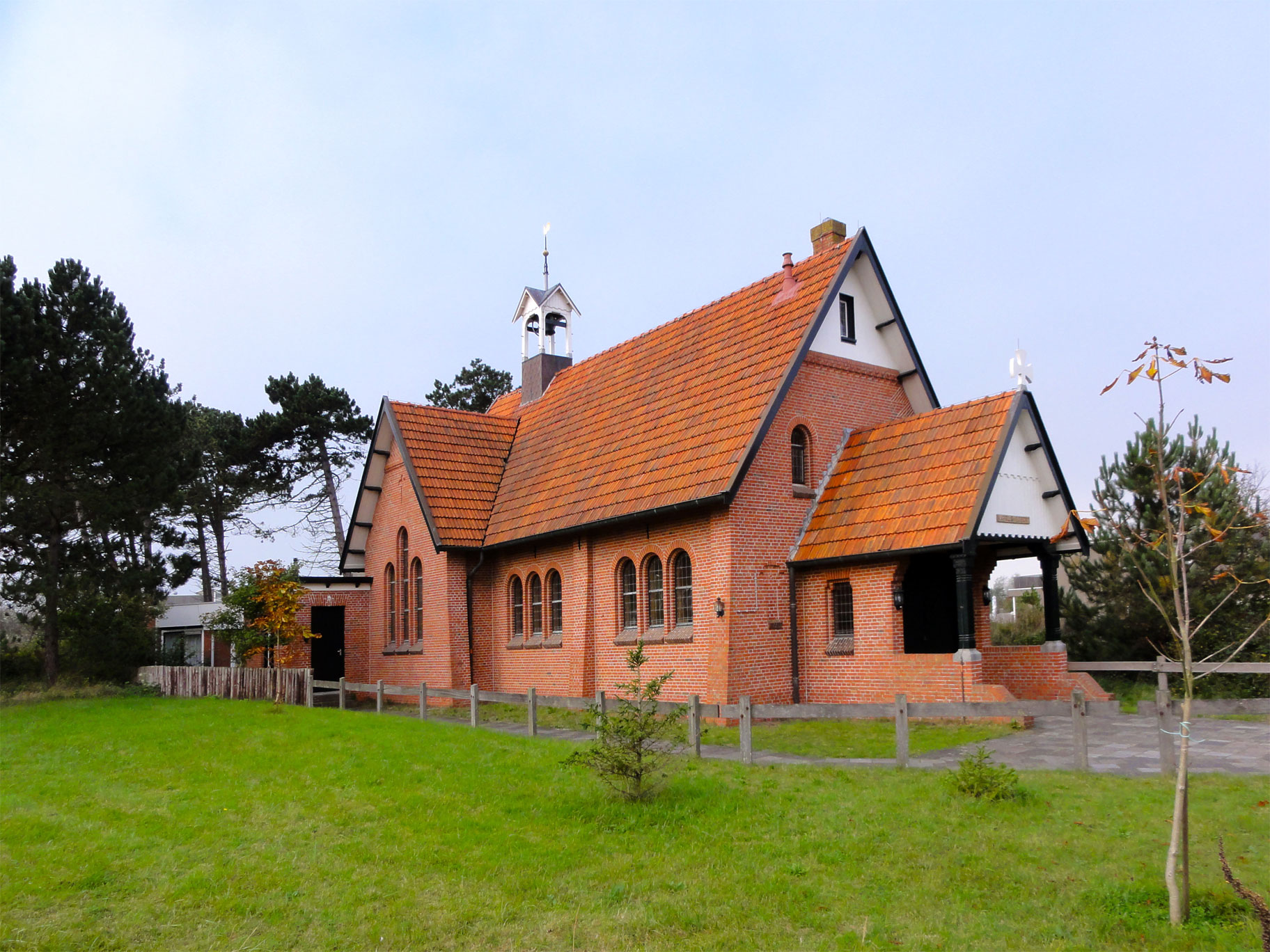 Sint-Egbertuskerk Badweg 69 in Schiermonnikoog